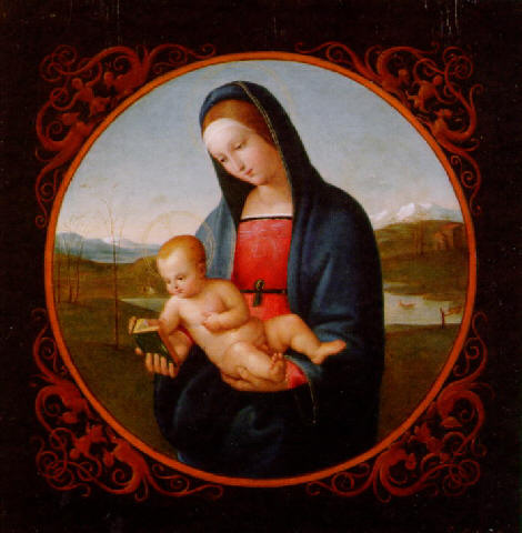 Joseph Anton Settegast, Maler, Nazarener, Madonna mit Jesuskind, 1839